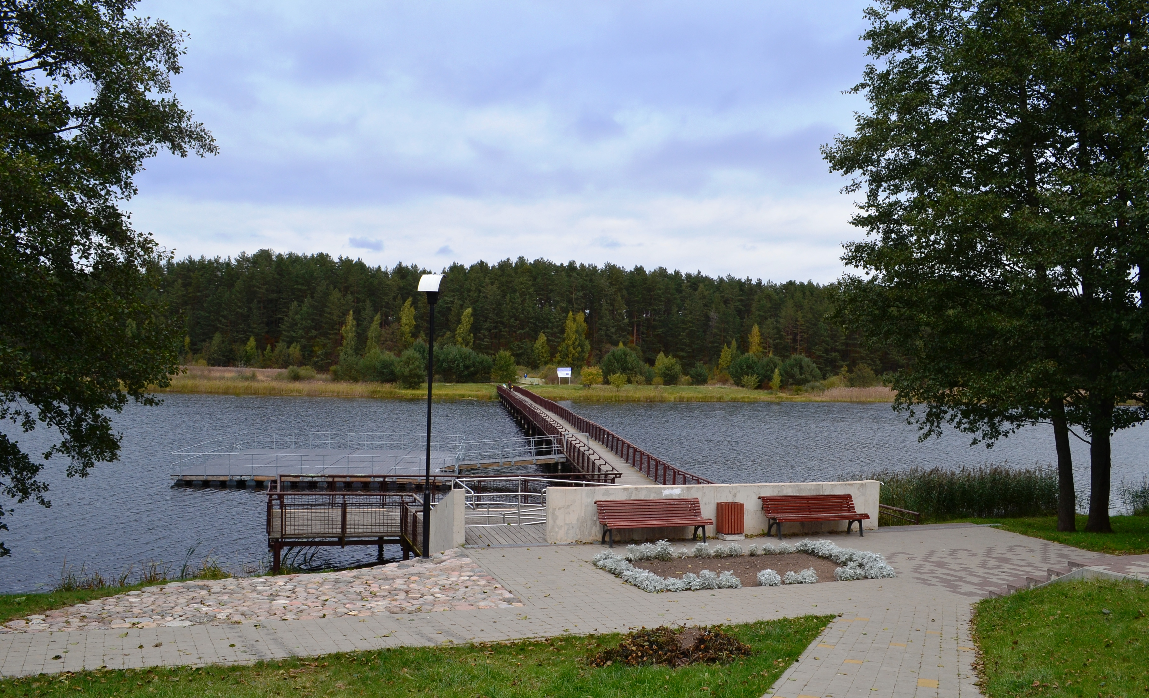 Tiltas per Paplovinį, Ignalina